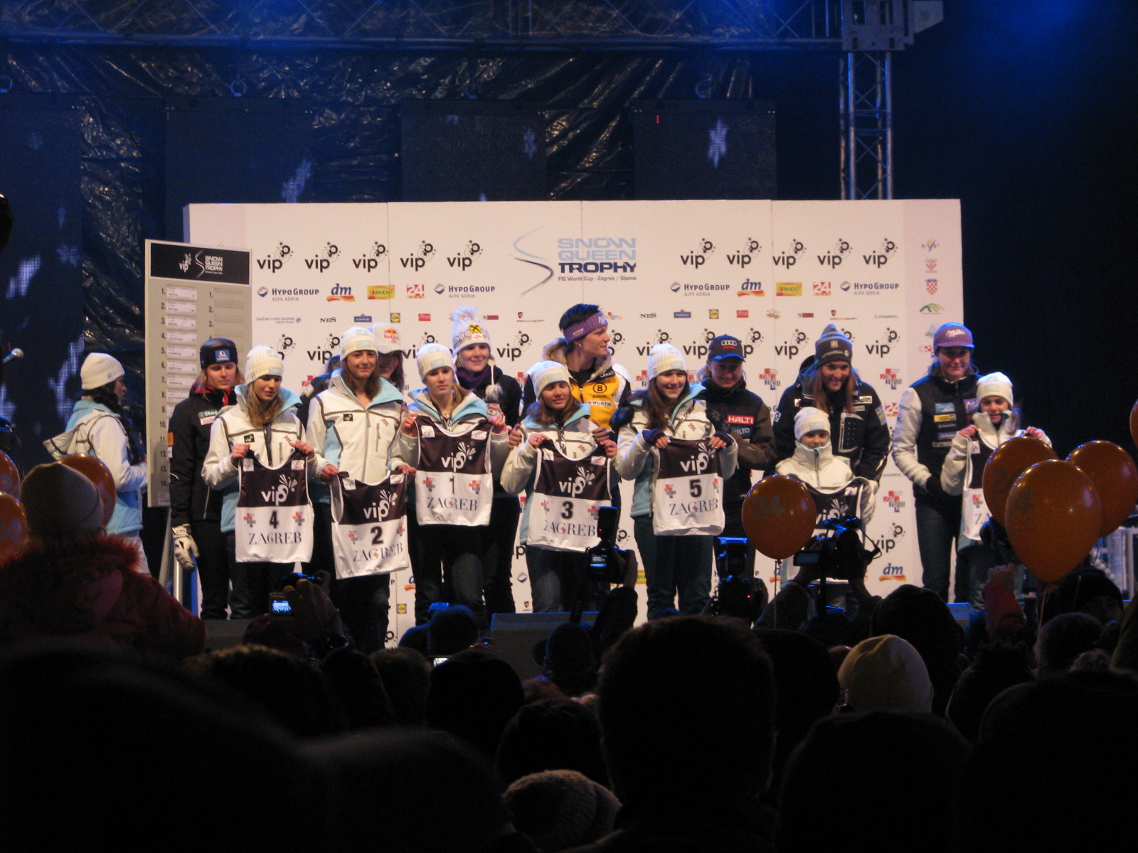 Izvlačenje startnih brojeva za Snježnu kraljicu na Trgu bana Jelačića u Zagrebu 3.1.2009.